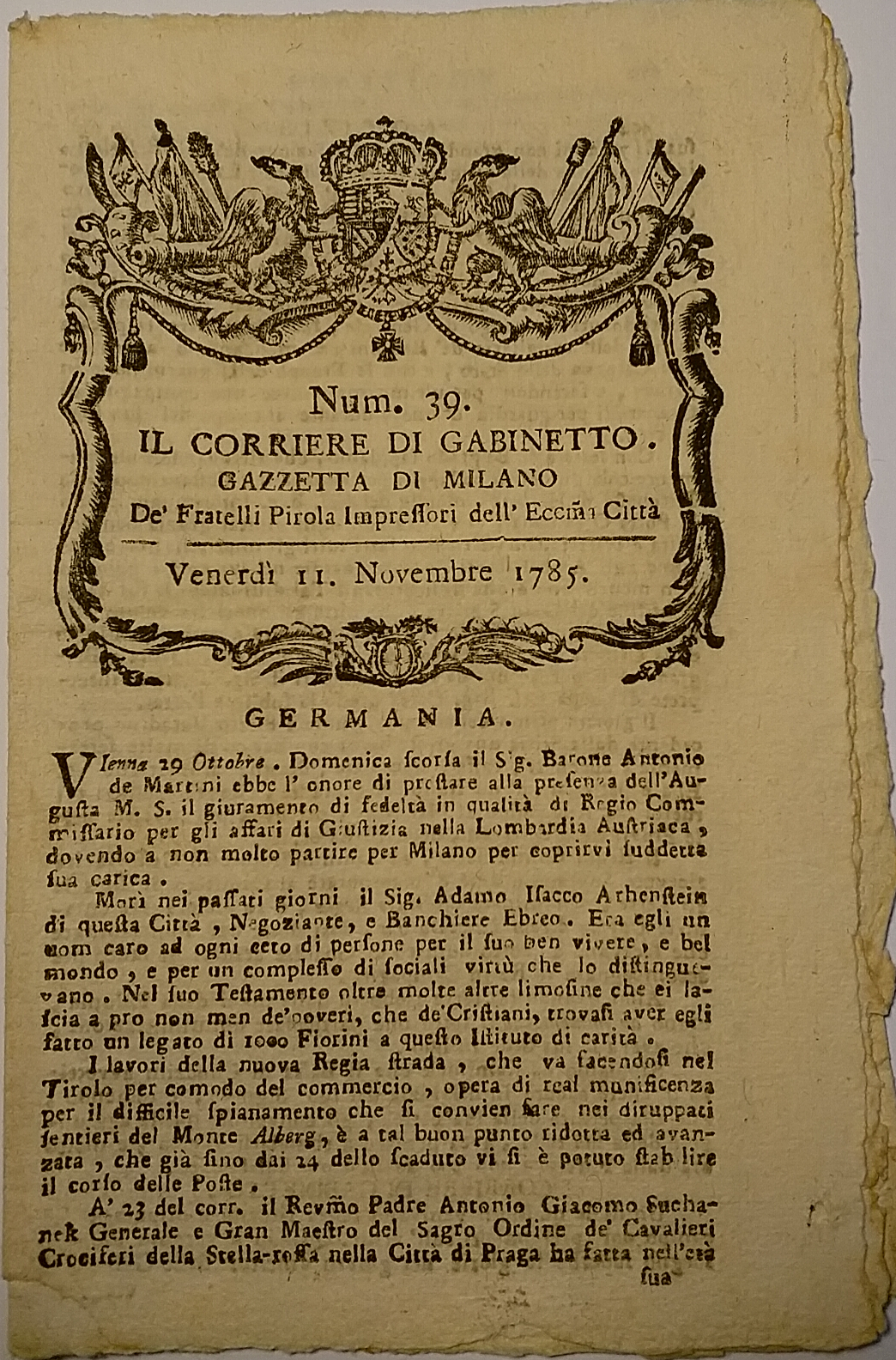 Corriere di Gabinetto - Gazzetta di Milano - de; Fratelli Pirola Impressori dell'Ecc.ma città - numero del 11 Novembre 1785